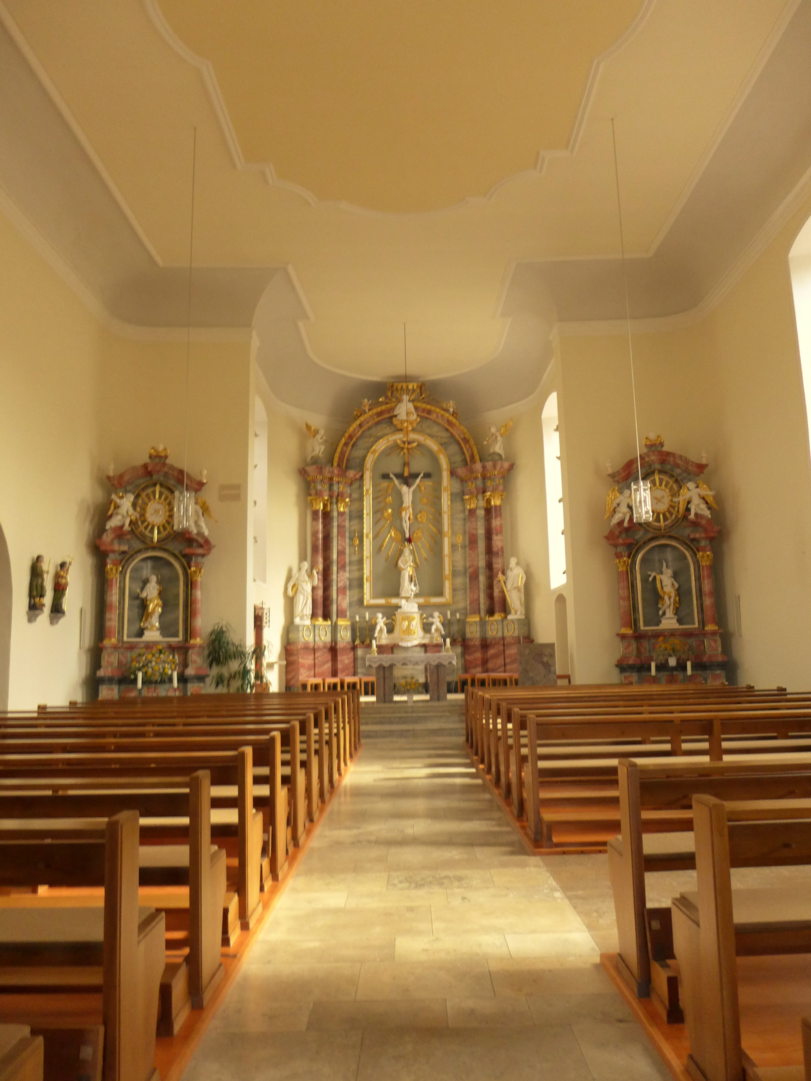 Eiersheim, Kirche St. Margaretha, Innenansicht